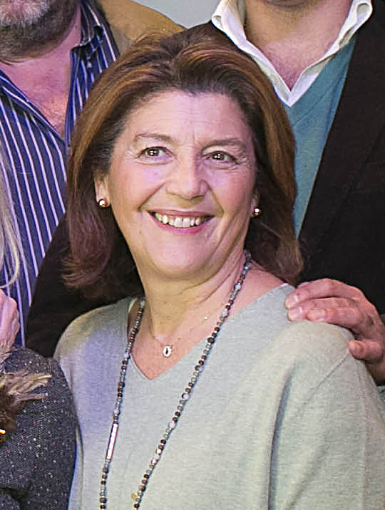 Copa de Navidad de Galapagar